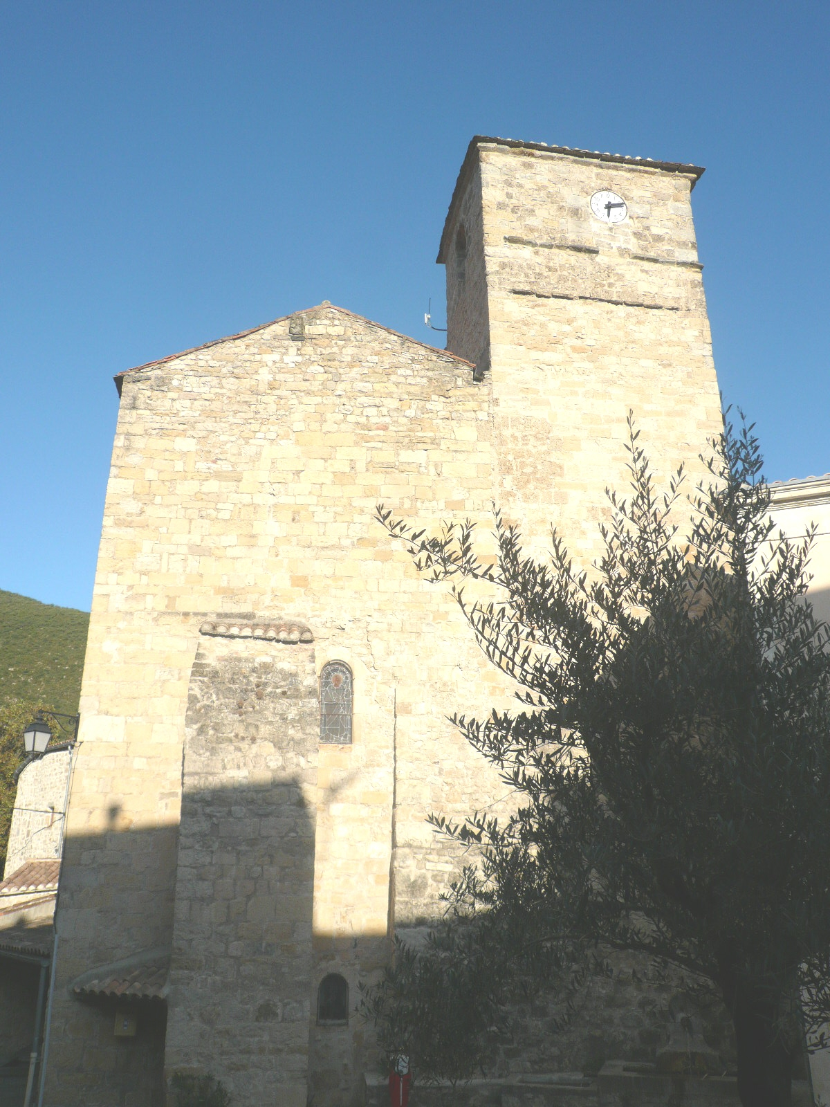 Église Sainte-Marie de Lauroux (Hérault)